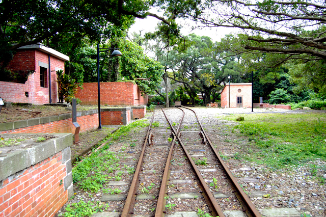 中文（台灣）: 淡水殼牌倉庫。